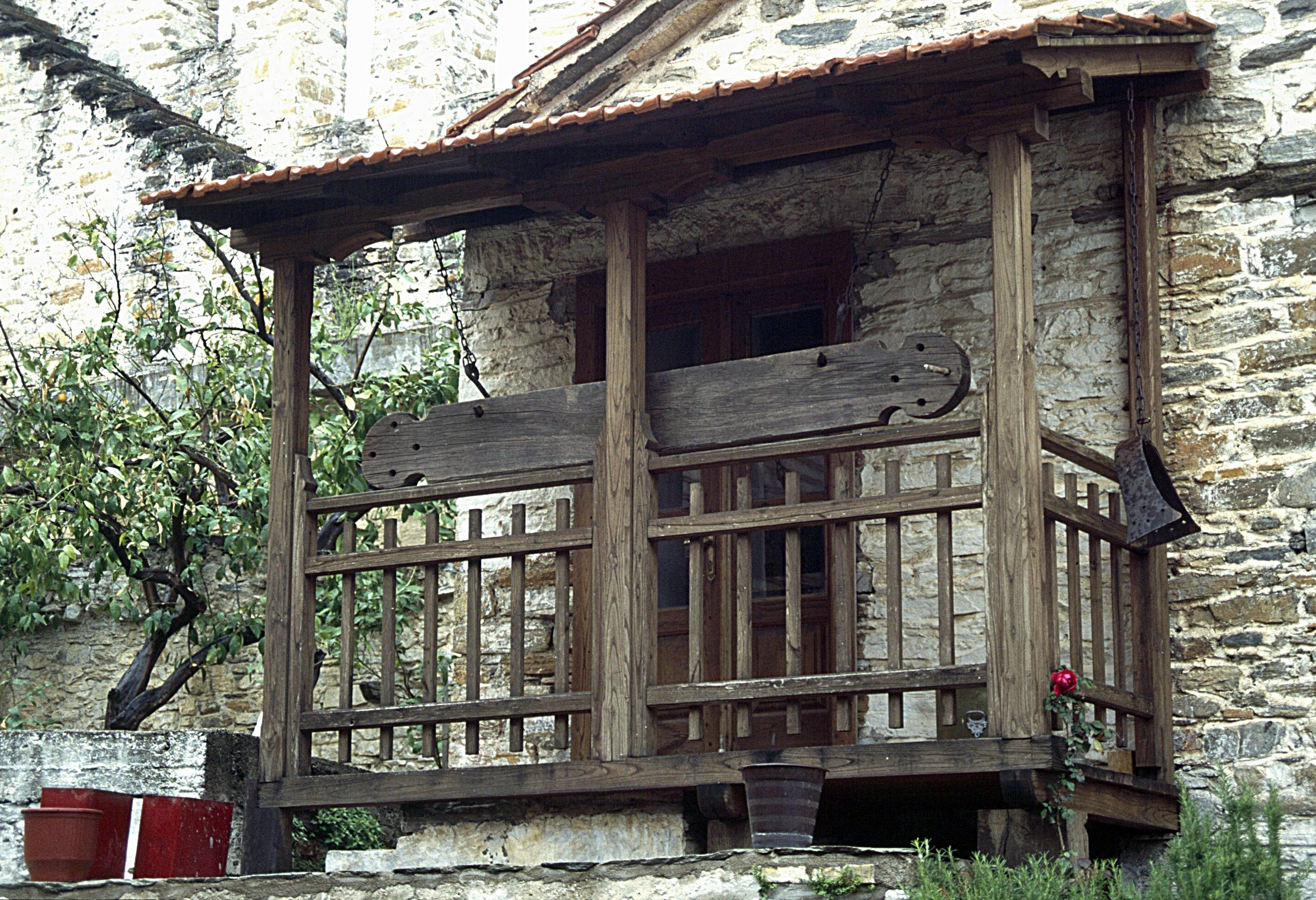 Athos: Moni Xenophontos, Semantron